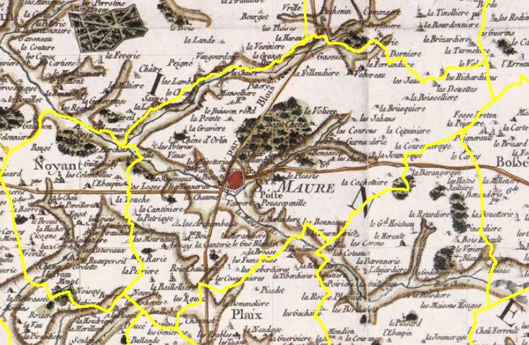 La commune de Sainte-Maure-de-Touraine sur la carte de Cassini.